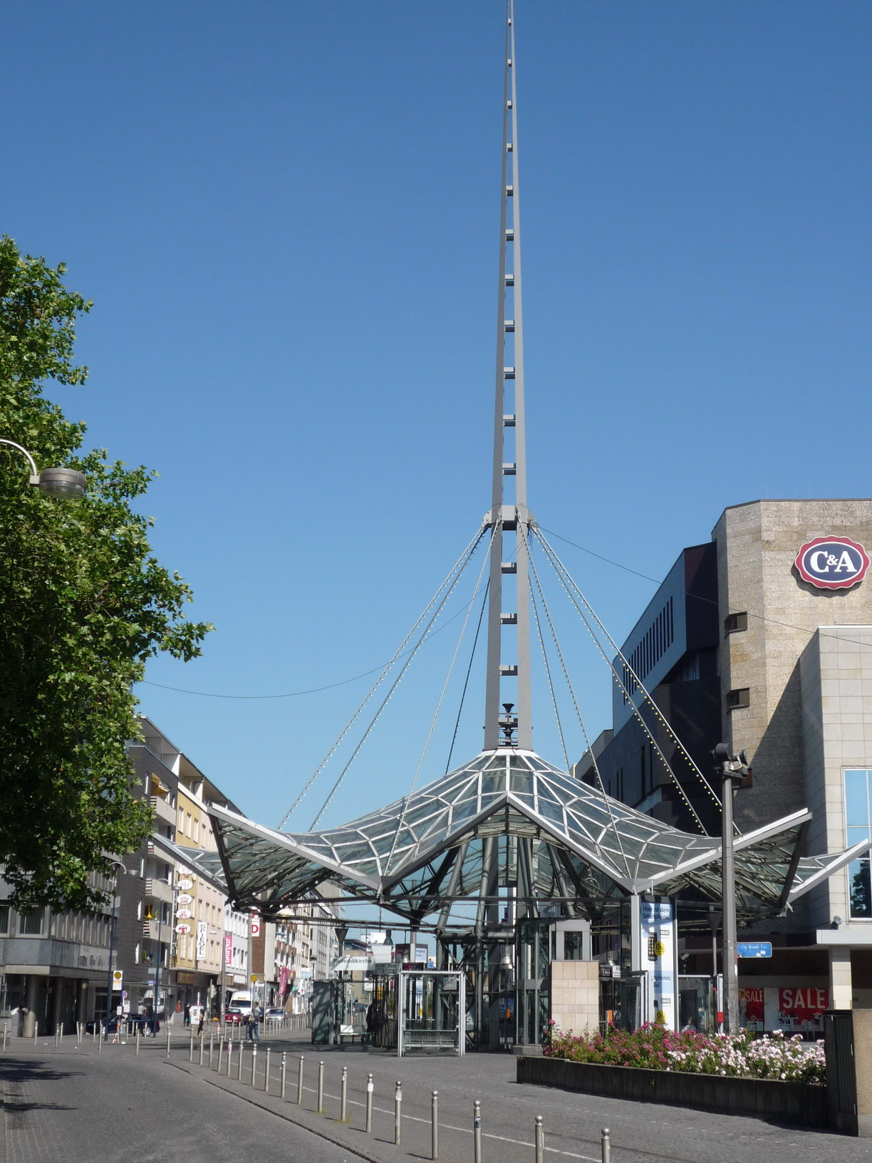 Eingang des U-Bahn-Kreuzungsbahnhofes Reinoldikirche